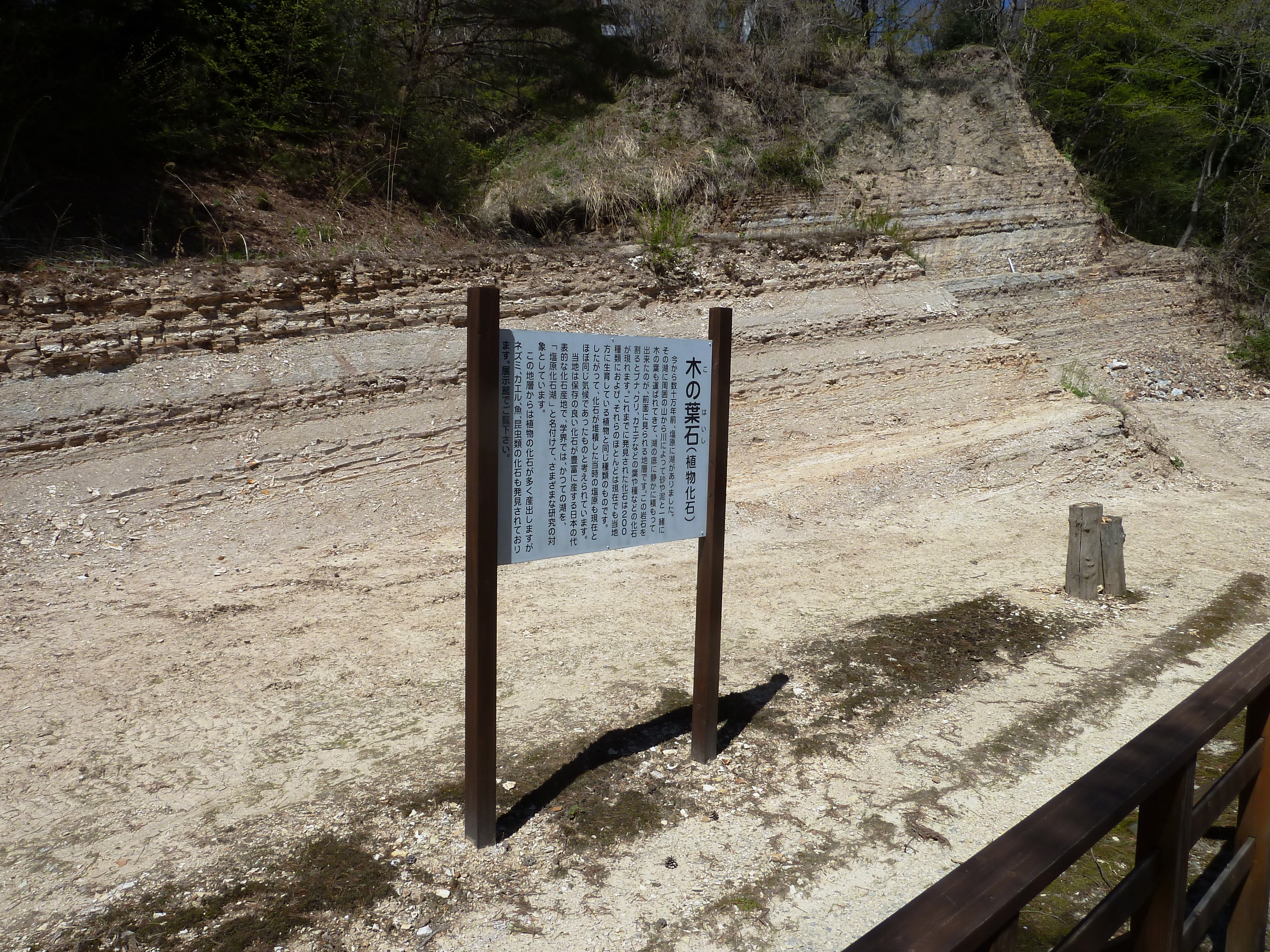 木の葉化石園塩原湖成層露頭 an outcropof fossilized leaf geopark in Shiobara hotspa